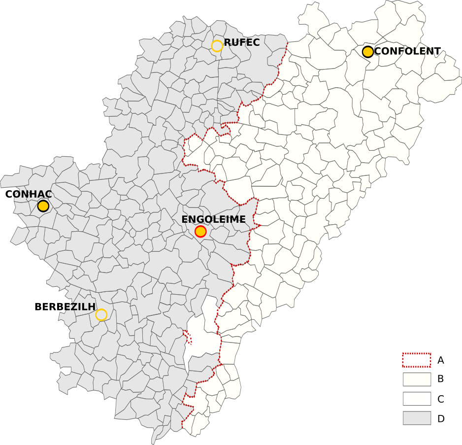 Las comunas de Charanta A. Frontièra òc/oïl B. Comunas occitanas C. Comunas emb un bocin occitan D. Comunas peitavinas-santongesas